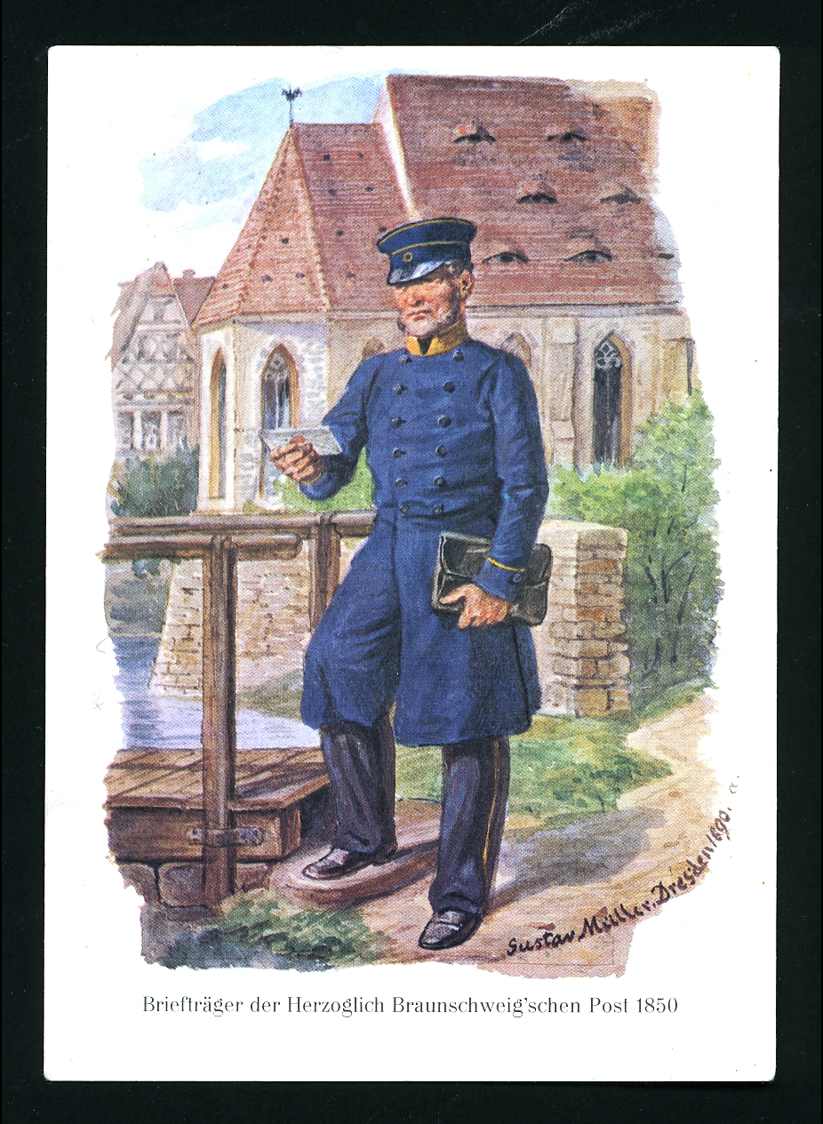 Brieftraeger der Herzoglich Braunschweigschen Post von 1850